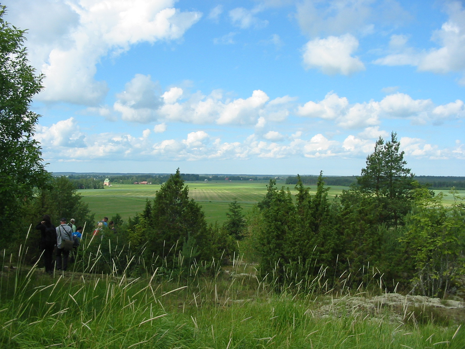 Näkymä Kokemäen Orjapaaden kallioilta länteen.